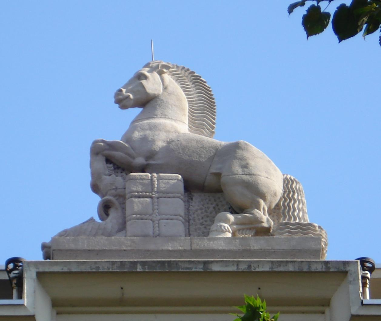 Rotterdam, Blaak28 (voorm. Twentsche Bank). sculpture Twentse Ros by Cor van Kralingen (1948). Rotterdam/The Netherlands.